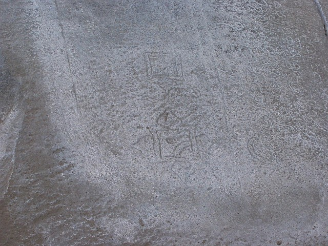 Prasasti Plumpungan di Salatiga, Jawa Tengah, Indonesia.